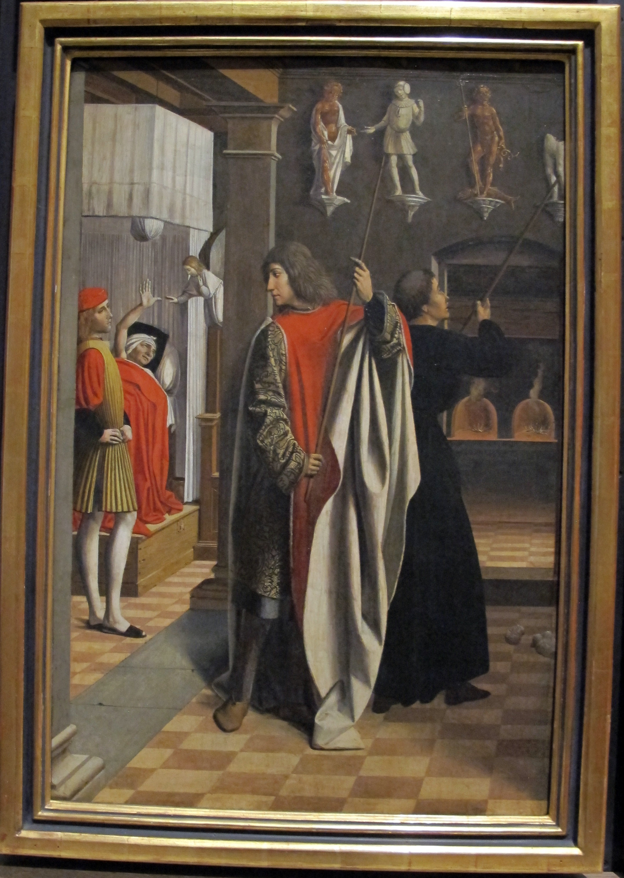 Philadelphia Museum of Art